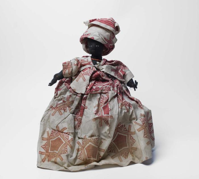 Pop.Gaspar van Breugel maakte in 1824 op zijn plantage Clifford Kocqshoven feest van de slaven mee, dat overging in een wintiritueel. Er werd gedurende drie dagen en nachten muziek gemaakt en gedanst. Naar aanleiding van dit ritueel liet Van Breugel, een setje miniatuurinstrumenten en zes poppen maken, die de danseressen voorstellen. Over de vrouwen schreef hij dat zij 'als een staalboek gekleed' gingen. (geciteerd in Legêne, 1998; 258). Hij gaf deze poppen aan zijn dochter en nichtjes om mee te spelen. Vier van deze poppen zijn nu in de collectie van het Tropenmuseum. Deze pop van zwart katoen met glaskraaltjes als ogen is gekleed in een kotomisi: wit katoenen onderrokken met daaroverheen een feestjurk van wit katoen bedrukt met rode motieven, jakje van dezelfde stof en zo ook de om het middel geknoopte borstdoek. Om de hals een snoer van lichtrode glaskraaltjes en op het hoofd een kunstig gevouwen hoofddoek. (Bron: Susan Legêne, De bagage van Blomhoff en Van Breugel, KIT Amsterdam 1998, p. 242-& 258. Tekst: LM, 14 april 2009). Pop in kotomisi kostuum